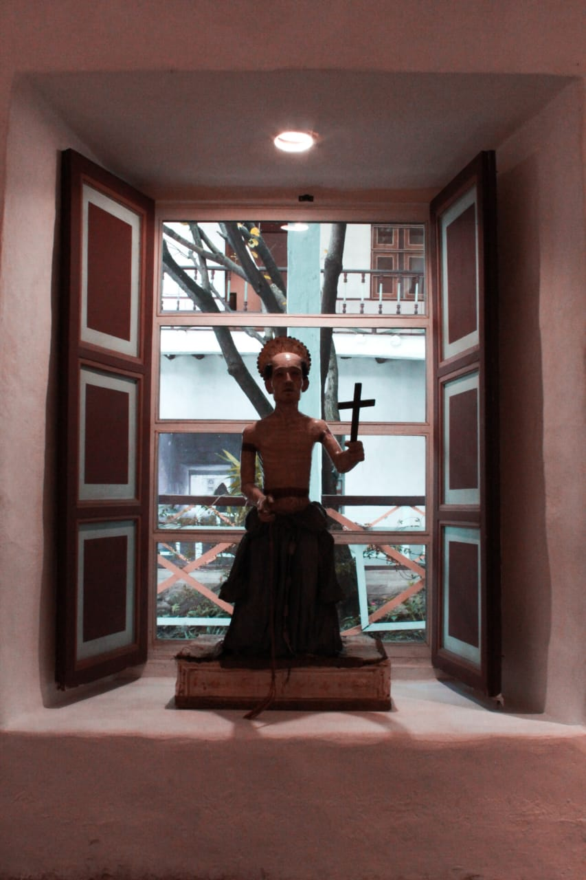 San Pedro de Alcántara